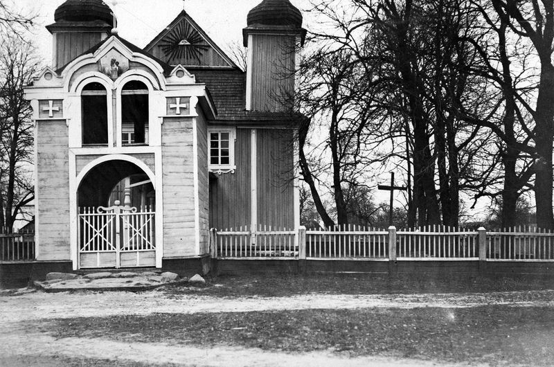 Беларуская (тарашкевіца): Безьдзеж (Bieździež), пляц Рынак (plac Rynak). Царква Сьвятой Тройцы